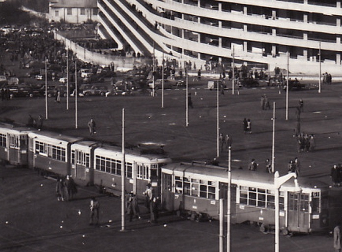 Tram serie 4000 sulla linea 61 a S.Siro nel 1955-1957 (particolare da cartolina)